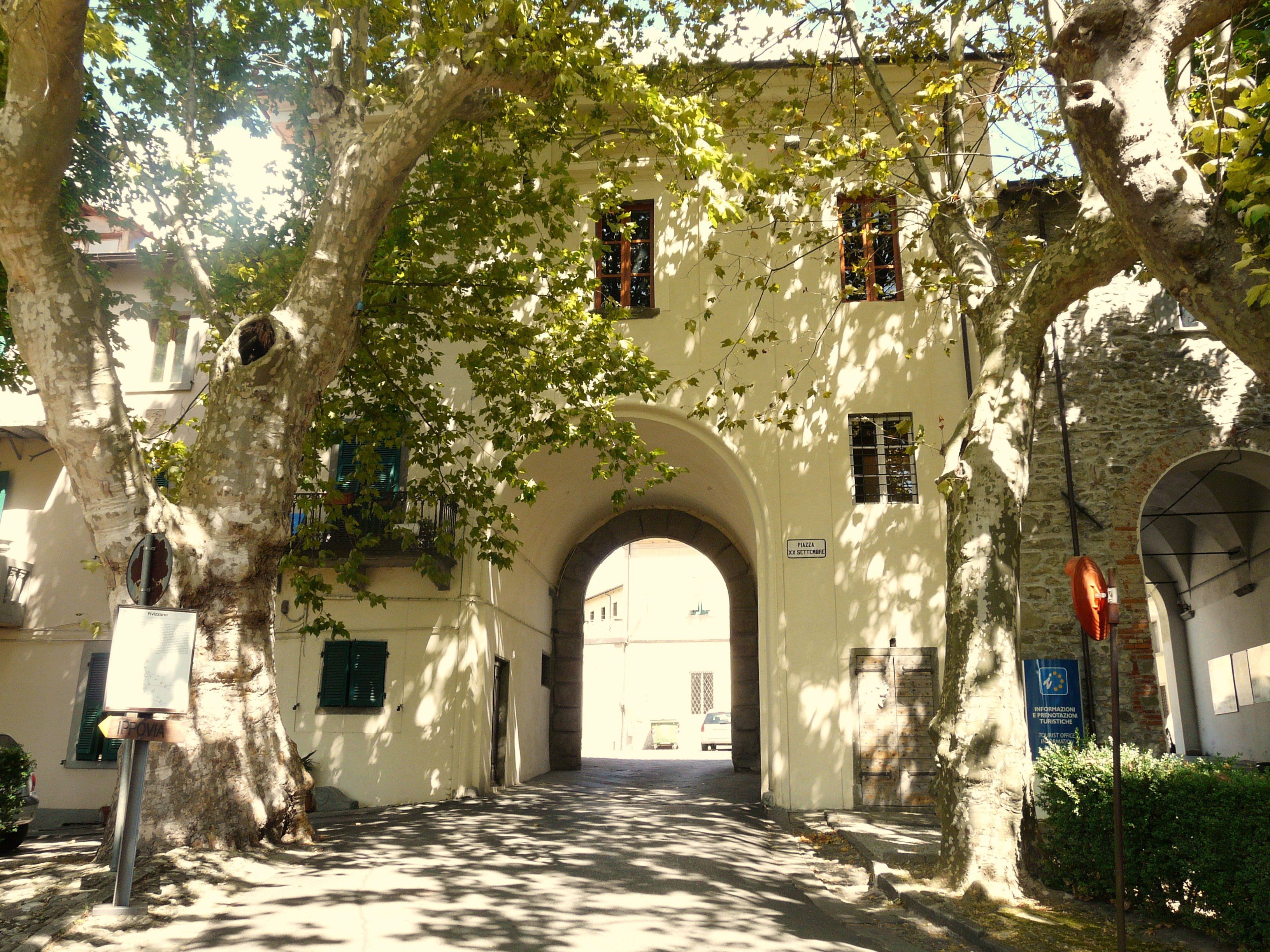 Porta detta "Sarzanese", Fivizzano, Toscana, Italia.